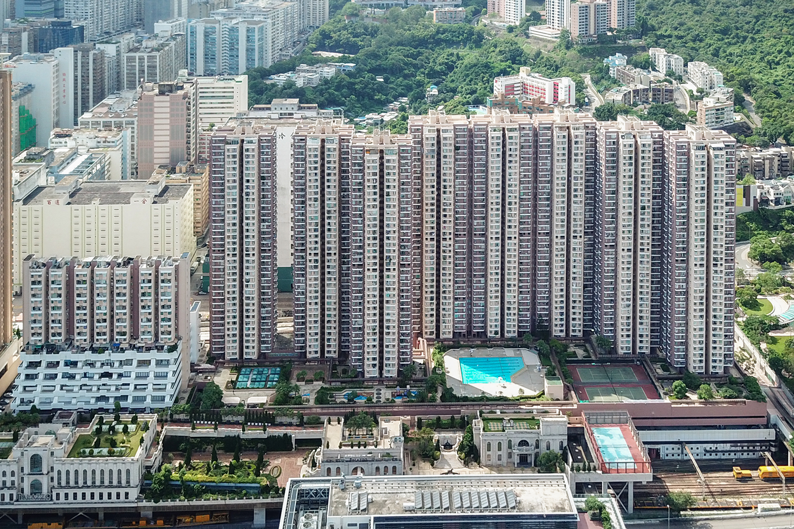 Jubilee Garden